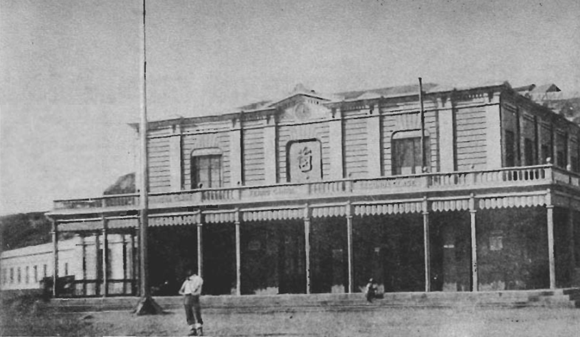 Primera estación de ferrocarriles de Valparaíso, inaugurada en 1863 con la entrada en servicio de la línea Santiago-Valparaíso.